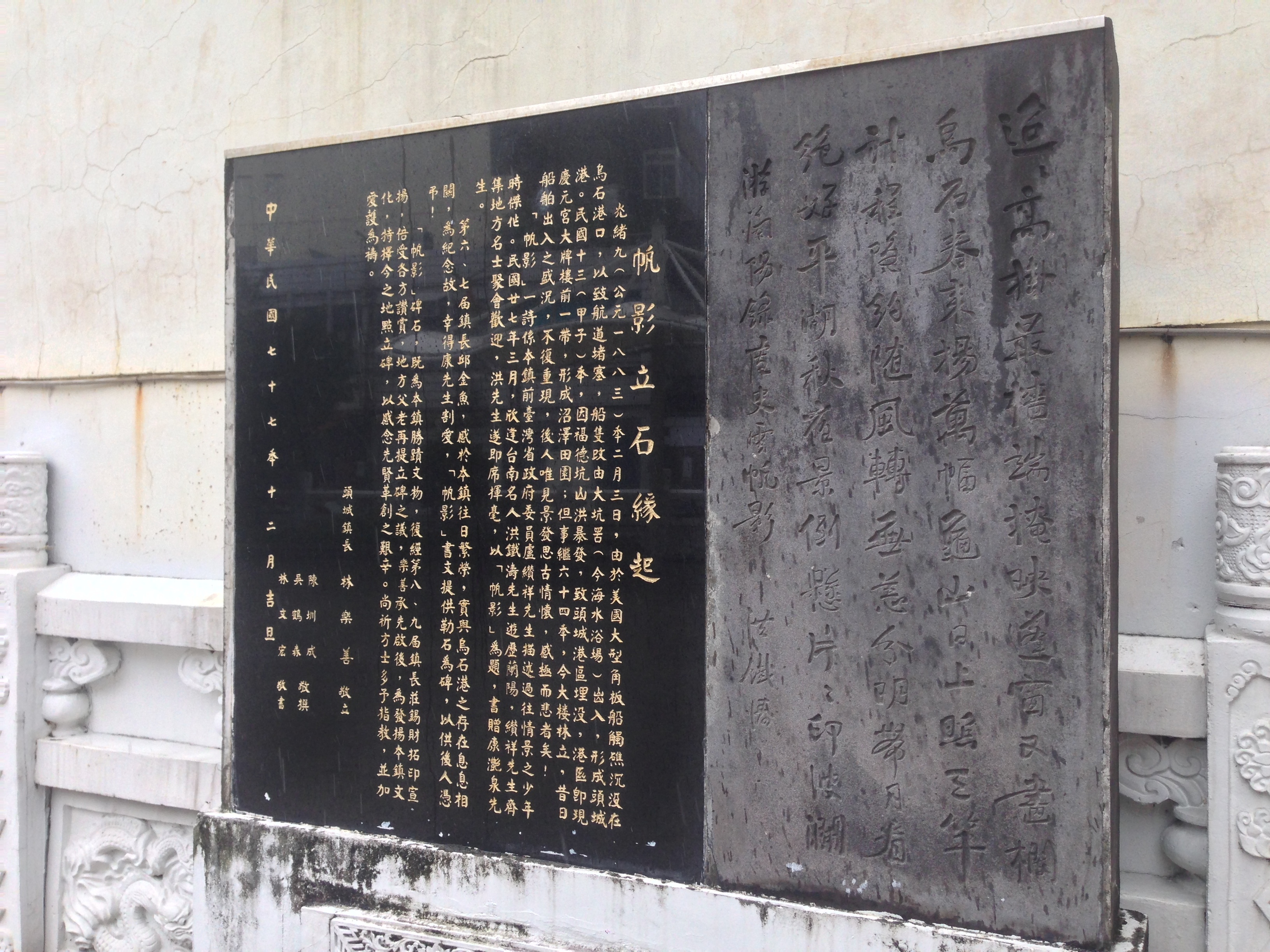 頭城慶元宮廟前帆影詩碑